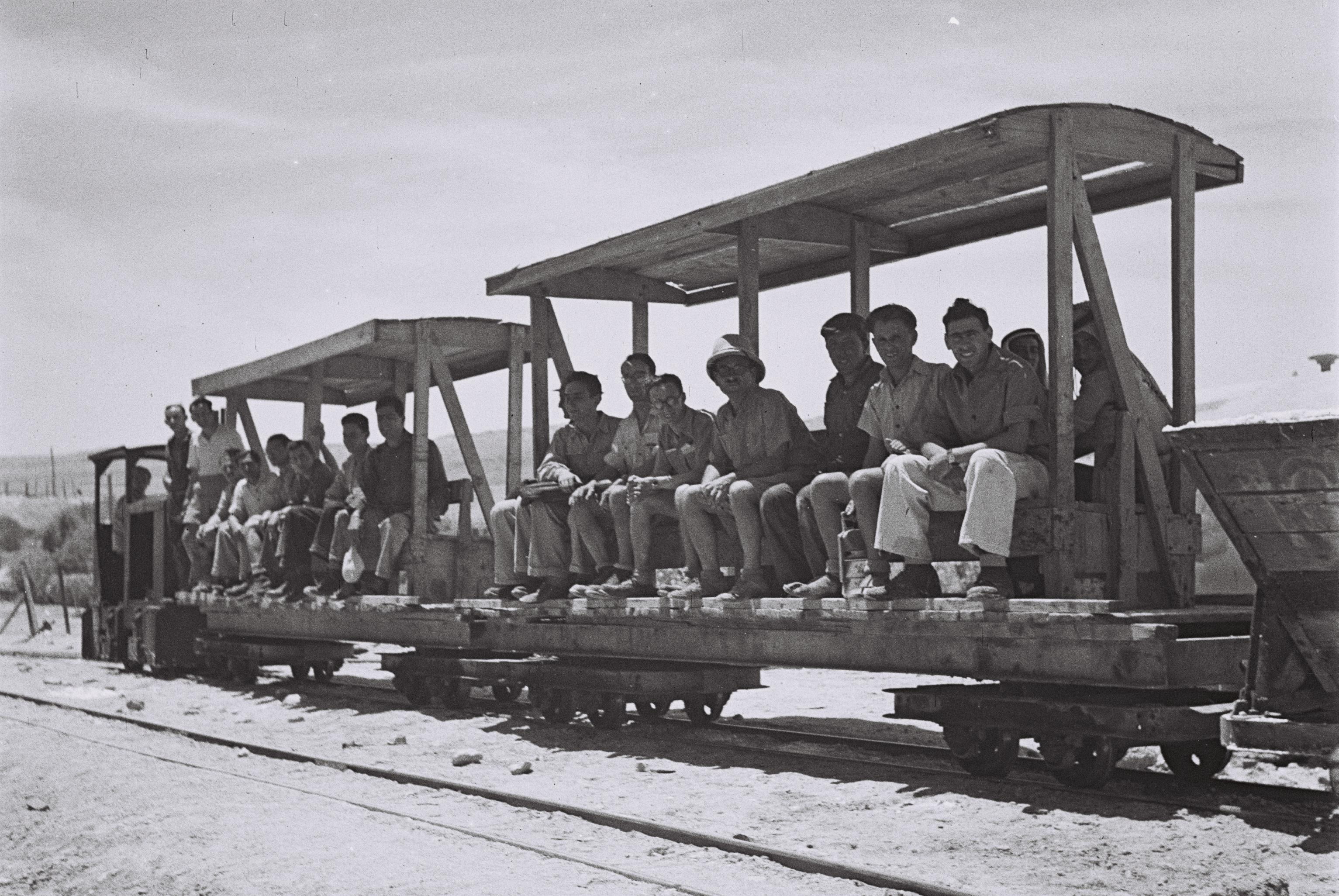 A MINIATURE TRAIN TAKING THE WORKERS FROM THEIR CAMP TO THE SODOM; POTASH FACTORY IN THE DEAD SEA. רכבת קלה לוקחת פועלים ממחנה העובדים למפעל, במפעל האשלגן "סדום" בים המלח.